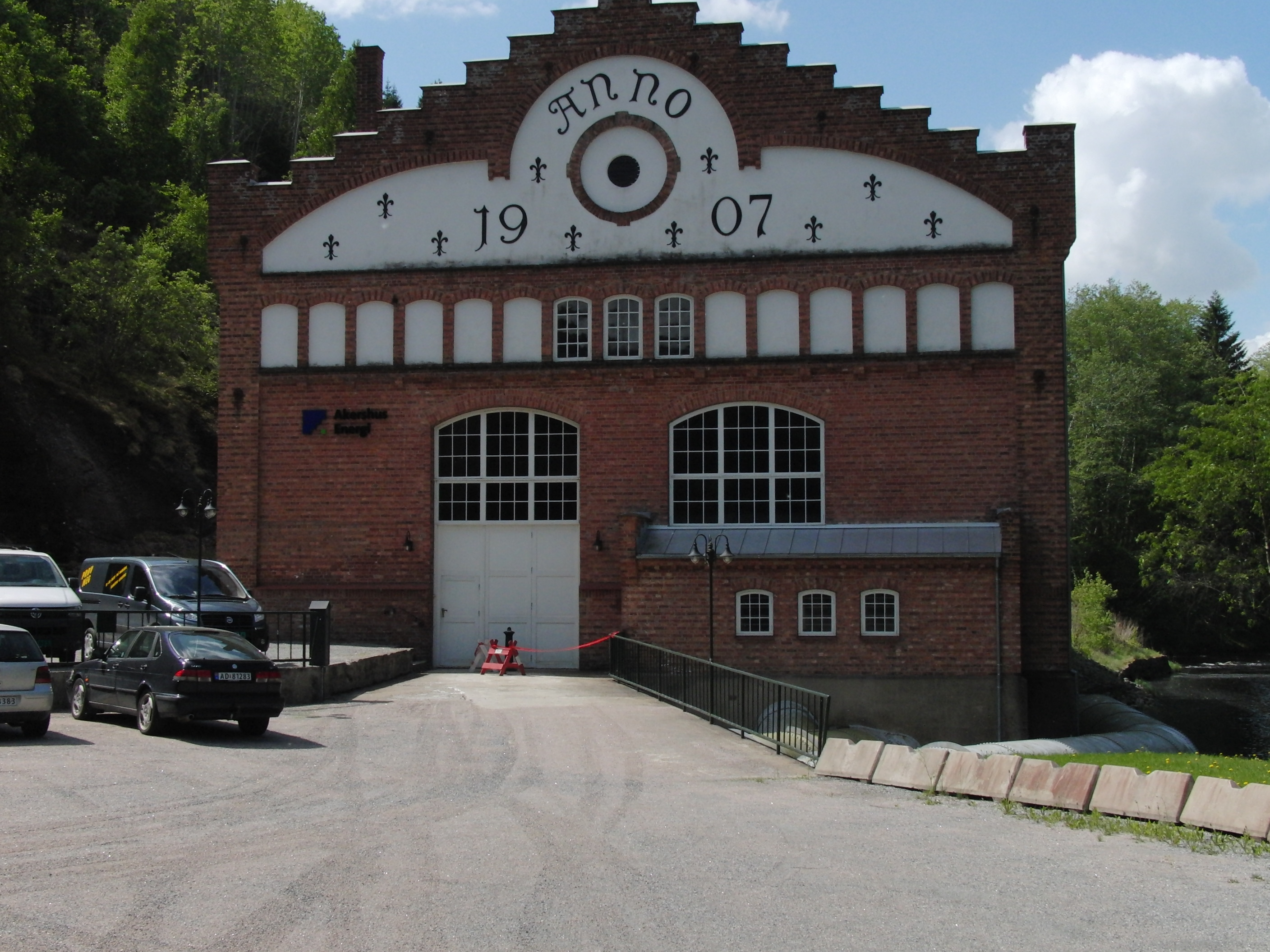 Den gamle stasjonen